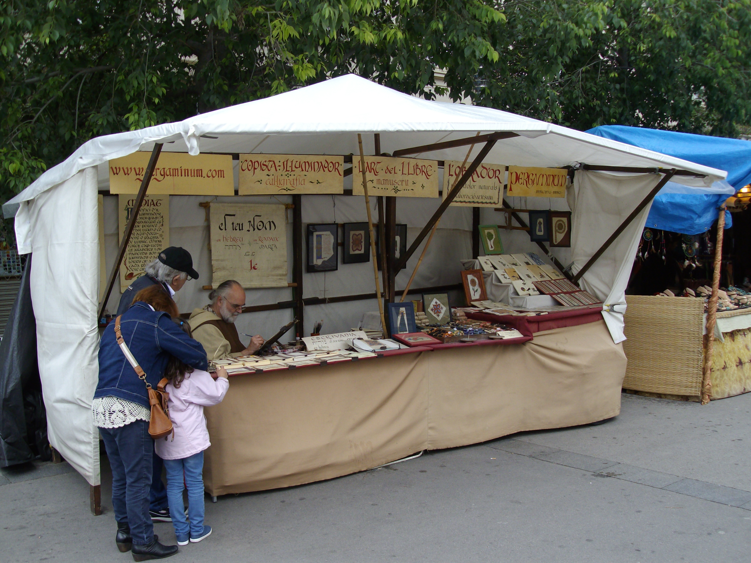 Feria medieval Medievàlia, celebrada los días 17, 18 y 19 de mayo de 2013 alrededor de la plaza del Mercado de Sabadell (Barcelona).